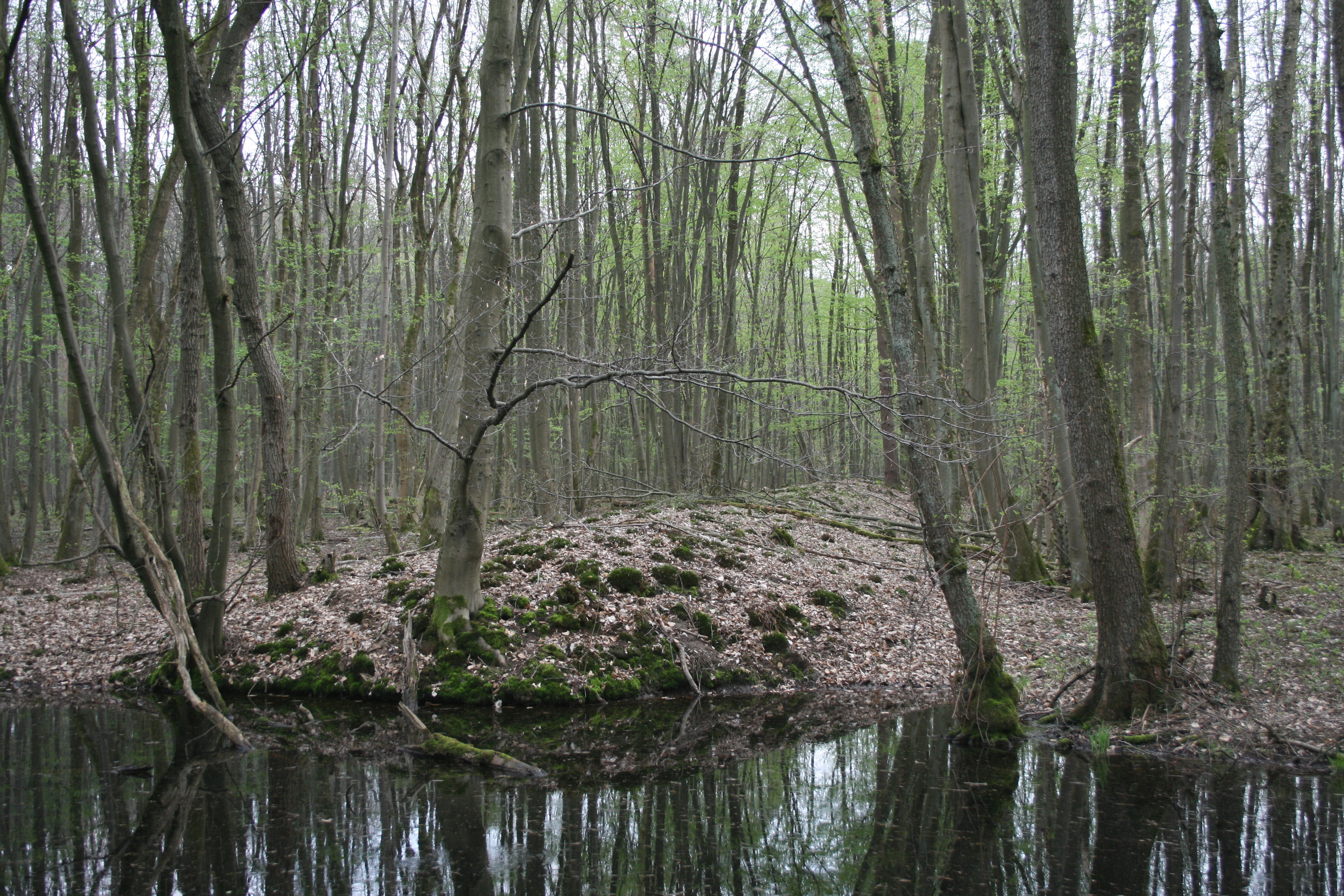 Der obergermanisch-Raetische Limes in der Nähe des vermuteten Wp 5/9 in der Bulau bei Erlensee; Naturschutzgebiet „Erlensee bei Erlensee“. Übergang über einen Seitenarm der Lache.